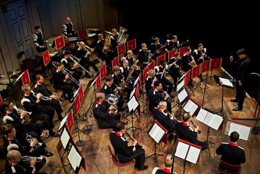 Arméns Musikkår på scenen